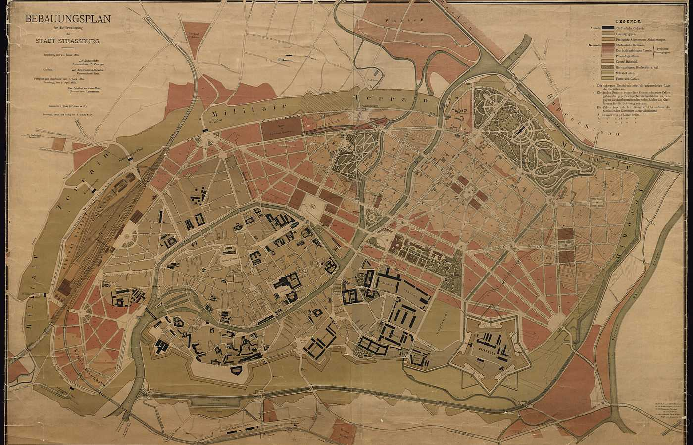 Projet d'urbanisme de l'architecte Conrath en 1880 pour la ville de Strasbourg